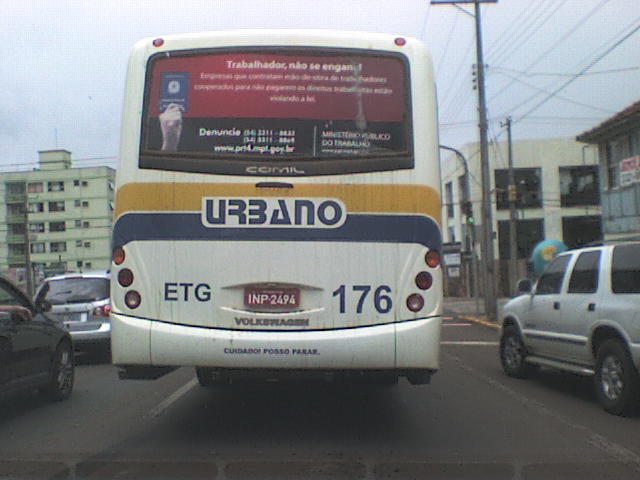 Exemplo de ônibus, popularmente conhecido no Rio Grande do Sul como "urbano".